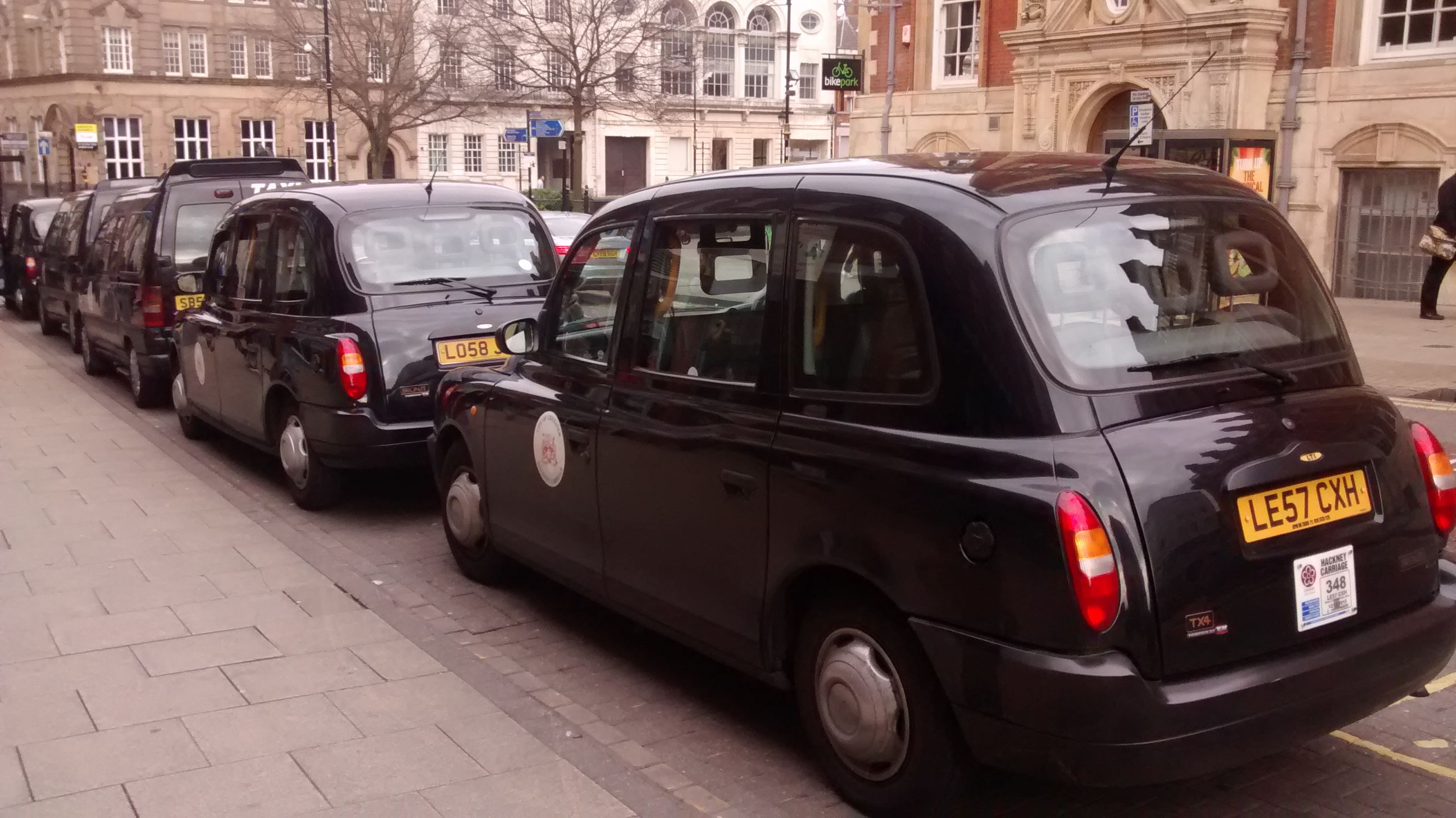 Postój Taksówek w centrum Leicester